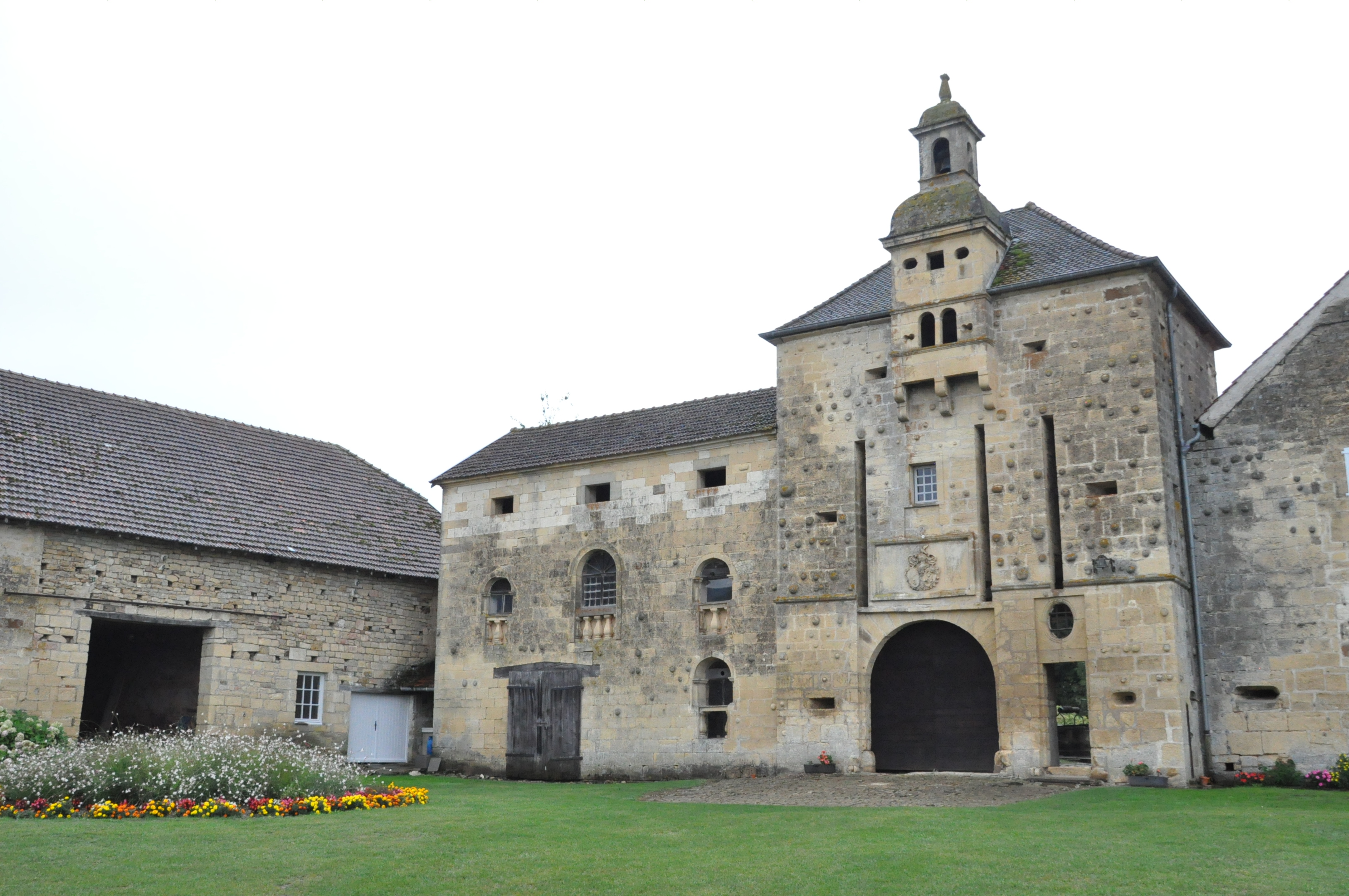 Château de Bougey (Inscrit) .